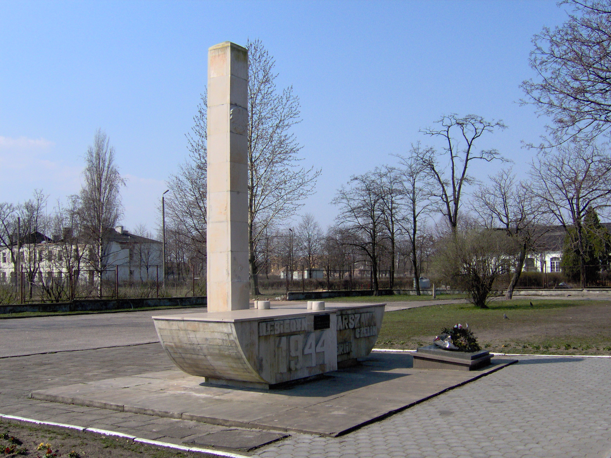 Pomnik Sapera przy ul. Żytniej 69 (2007 r.)